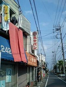 埼玉県川越市寺尾